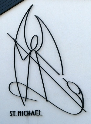 St.-Michael-Kirche in Mannheim-Blumenau.